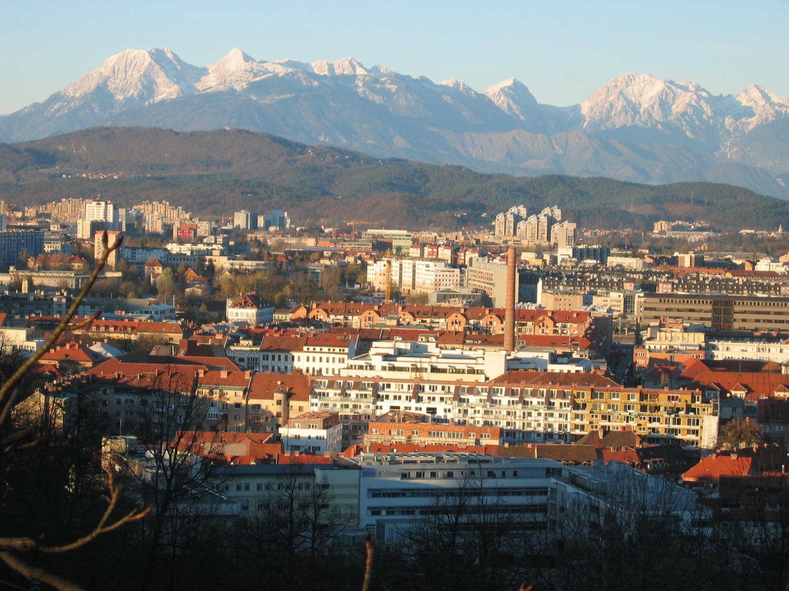 Ljubljana, pogled z Ljubljanskega gradu (v ozadju Kamniške Alpe).